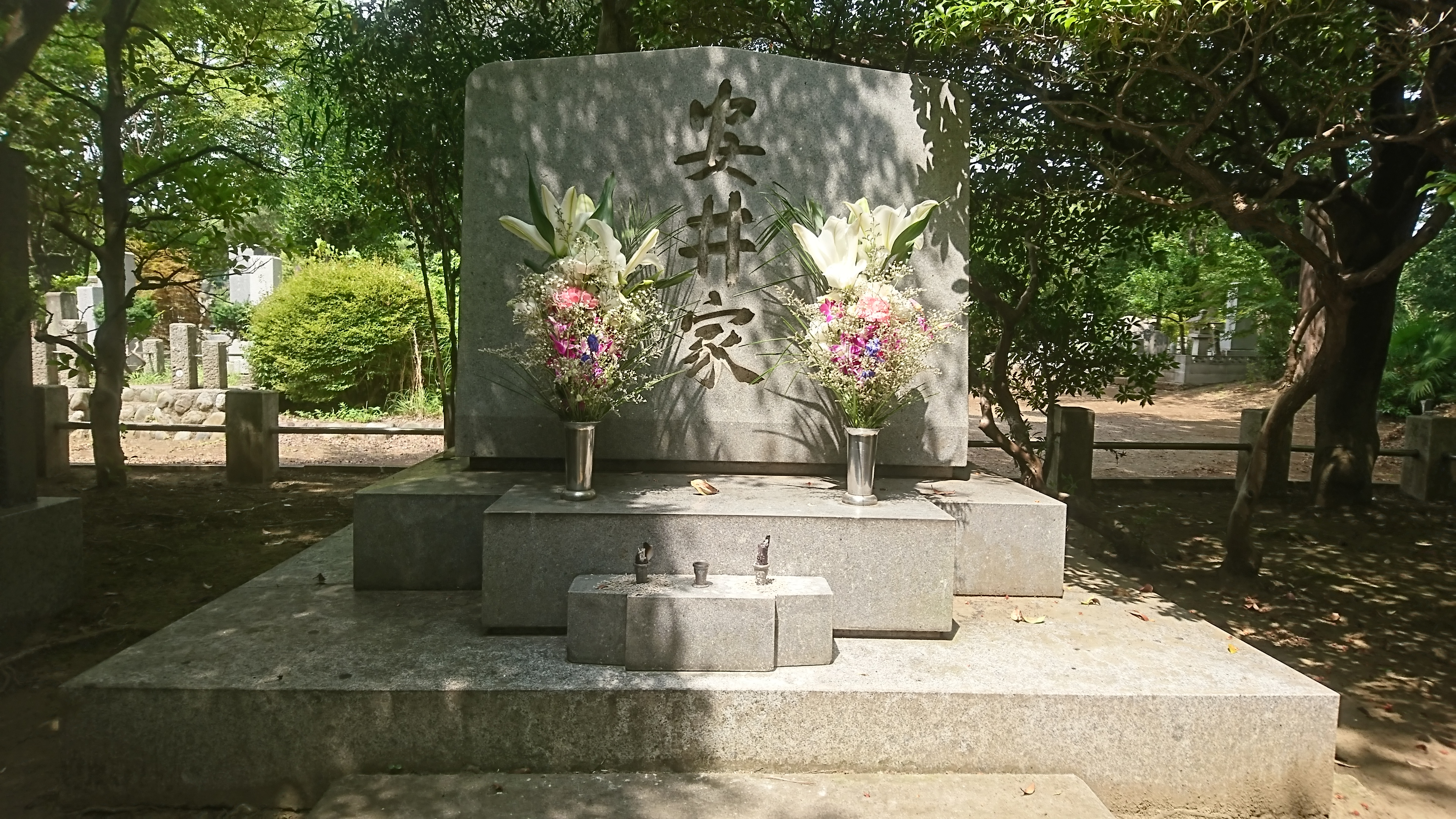 安井誠一郎の墓